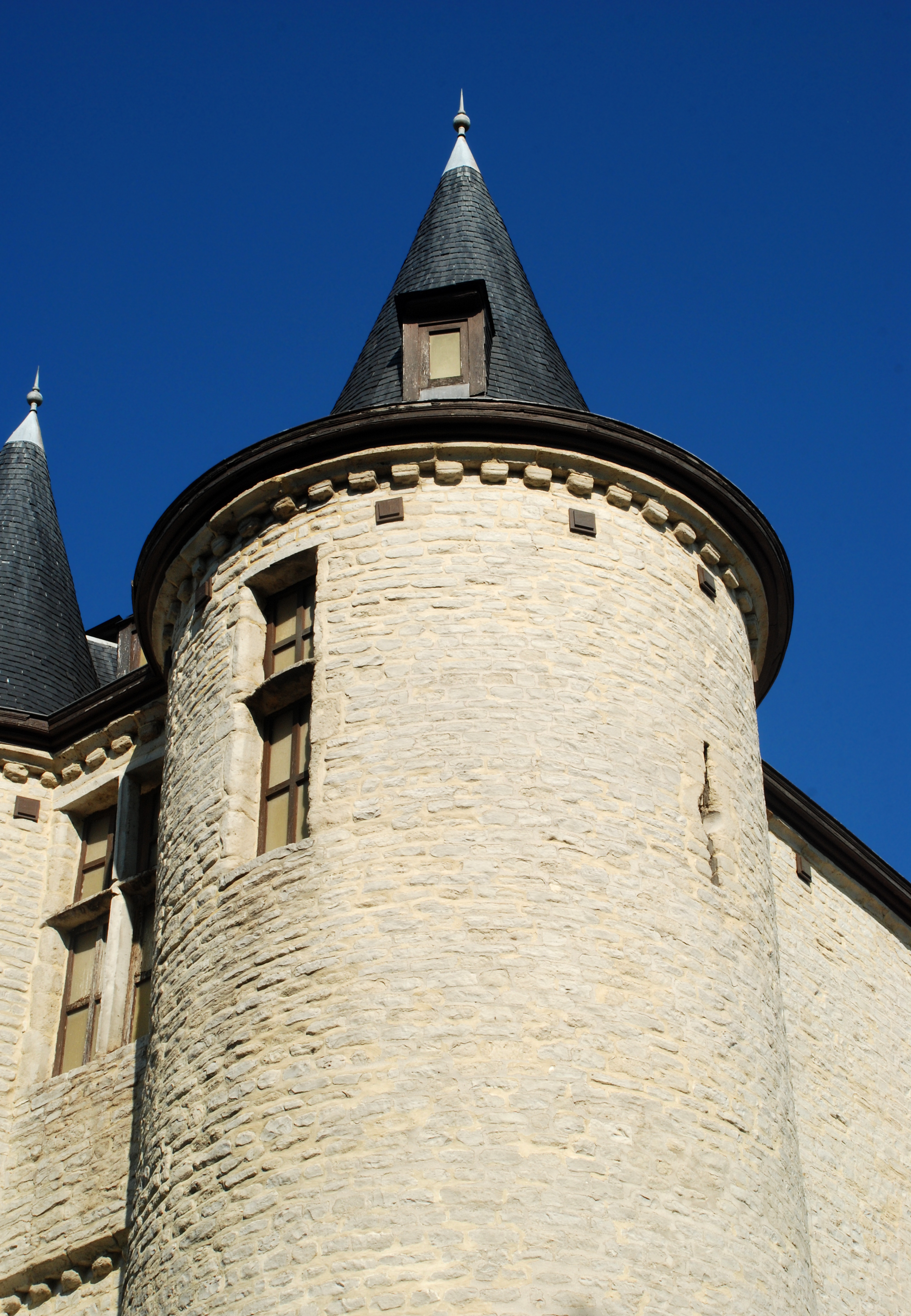 Belgique - Brabant flamand - Machelen - Diegem - Château Marga